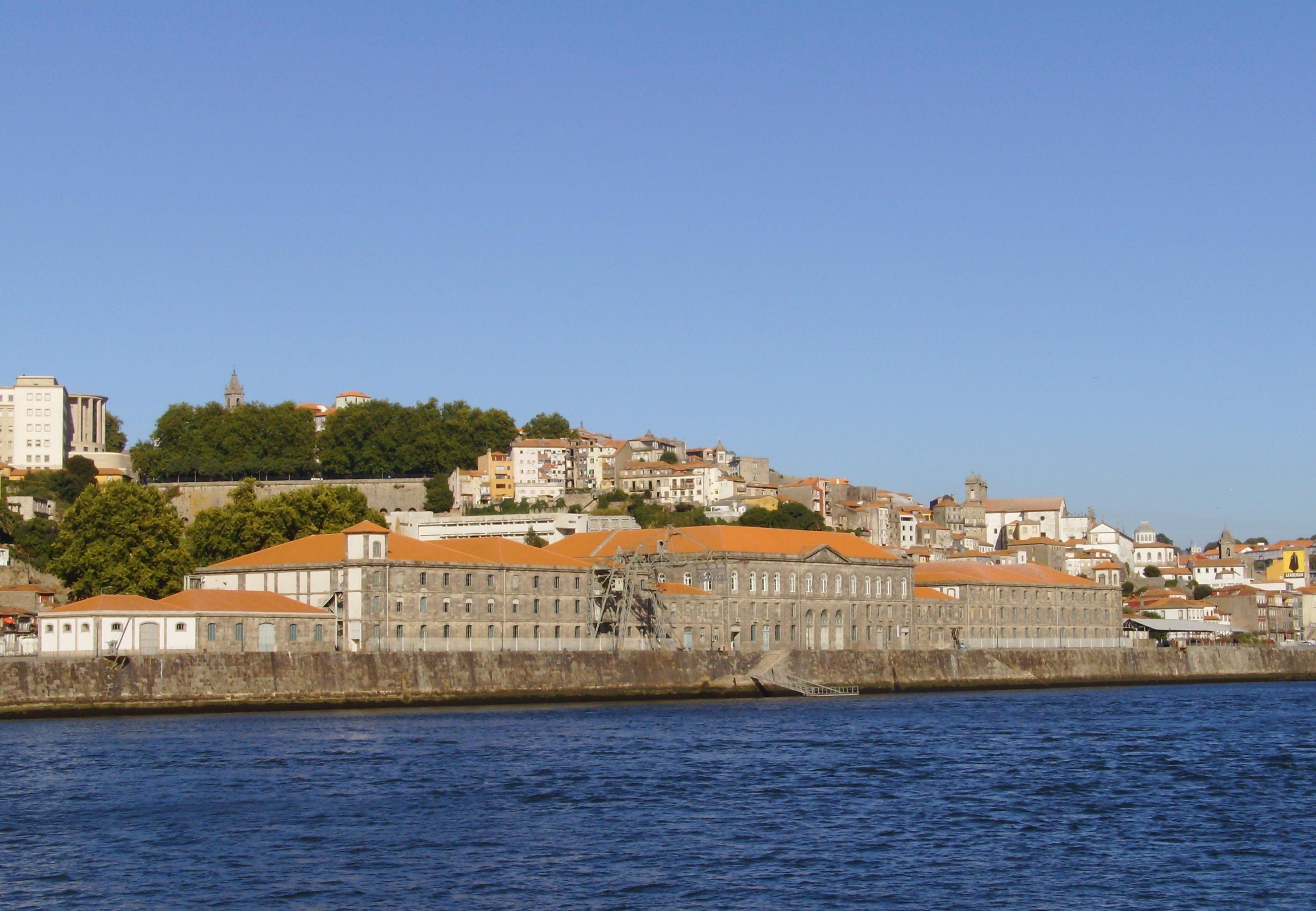 Edifício da Alfândega Nova, atual Museu dos Transportes e Comunicações, freguesia de Miragaia, Porto, distrito do Porto, Portugal: vista a partir do rio Douro.